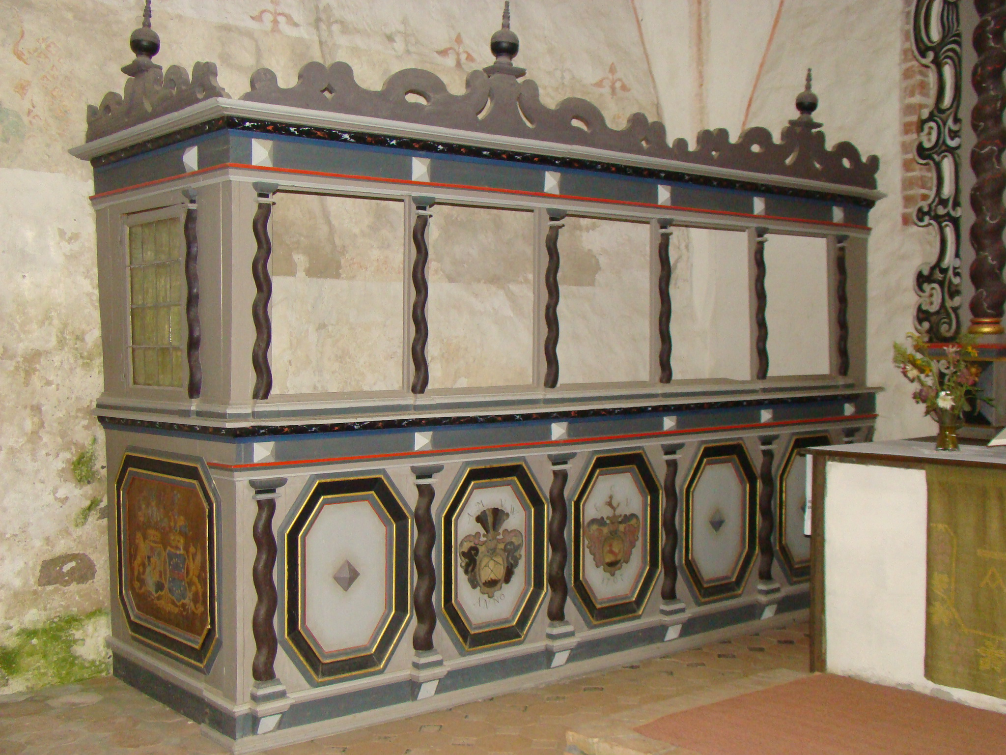 Patronatsloge in der Dorfkirche Groß Gievitz. Foto: Peter Schmelzle, August 2011.